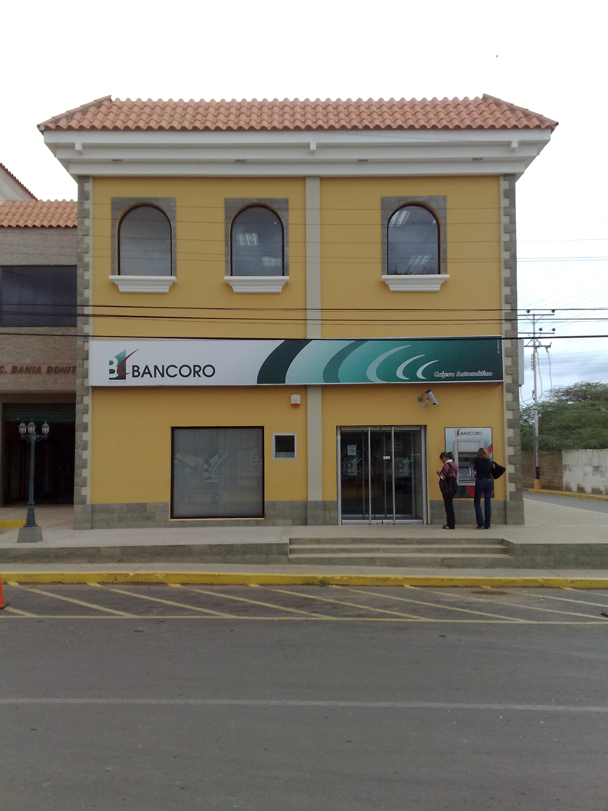 Agencia de Bancoro en Santa Cruz de Los Taques, vista desde la Plaza Bolívar.